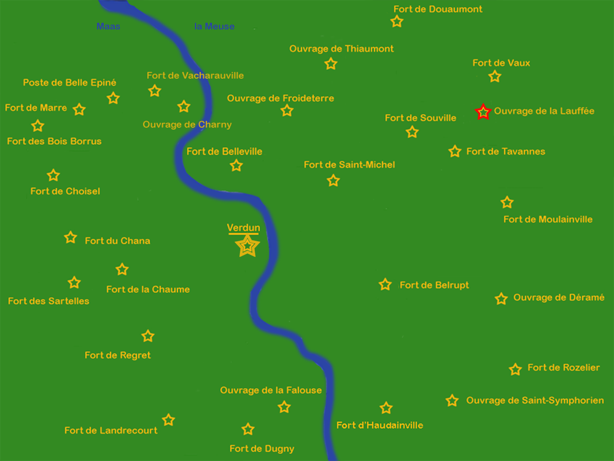 Stellungsplan Ouvrage de la Lauffée